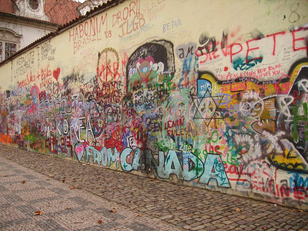 Autore= Maldark [1] Fonte= [2] Descrizione=Un tratto del "Muro di Lennon" Licenza=CC BY-SA 2.0 Note=